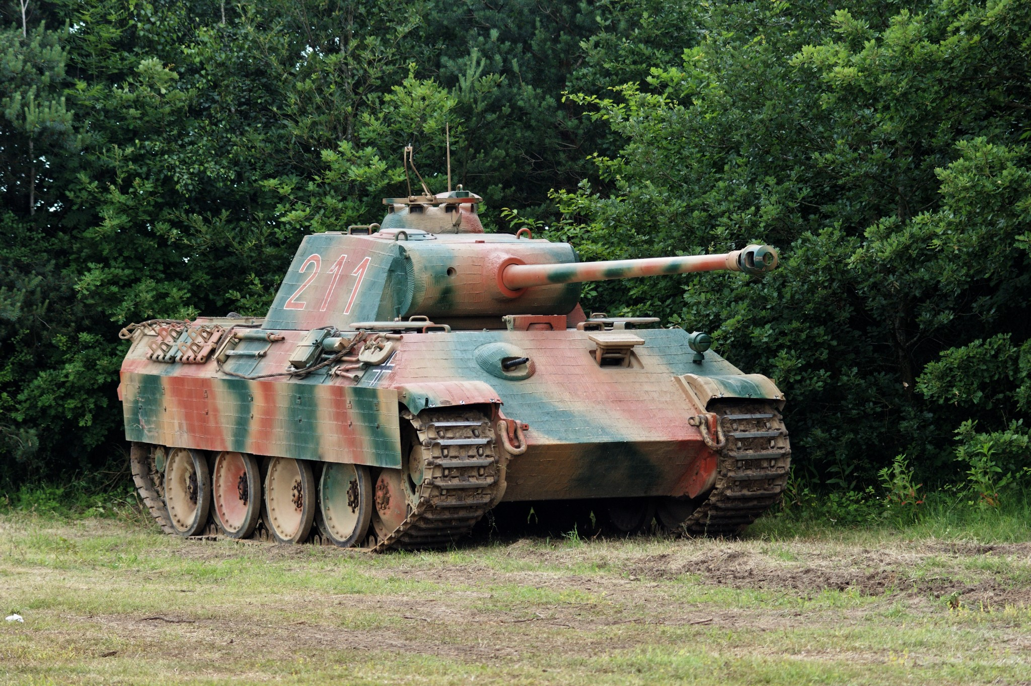 Char de combat PANTHER participant à La Locomotion en Fête - 2009. Le PANTHER, char allemand, a beaucoup été utilisé pendant la seconde guerre mondiale.